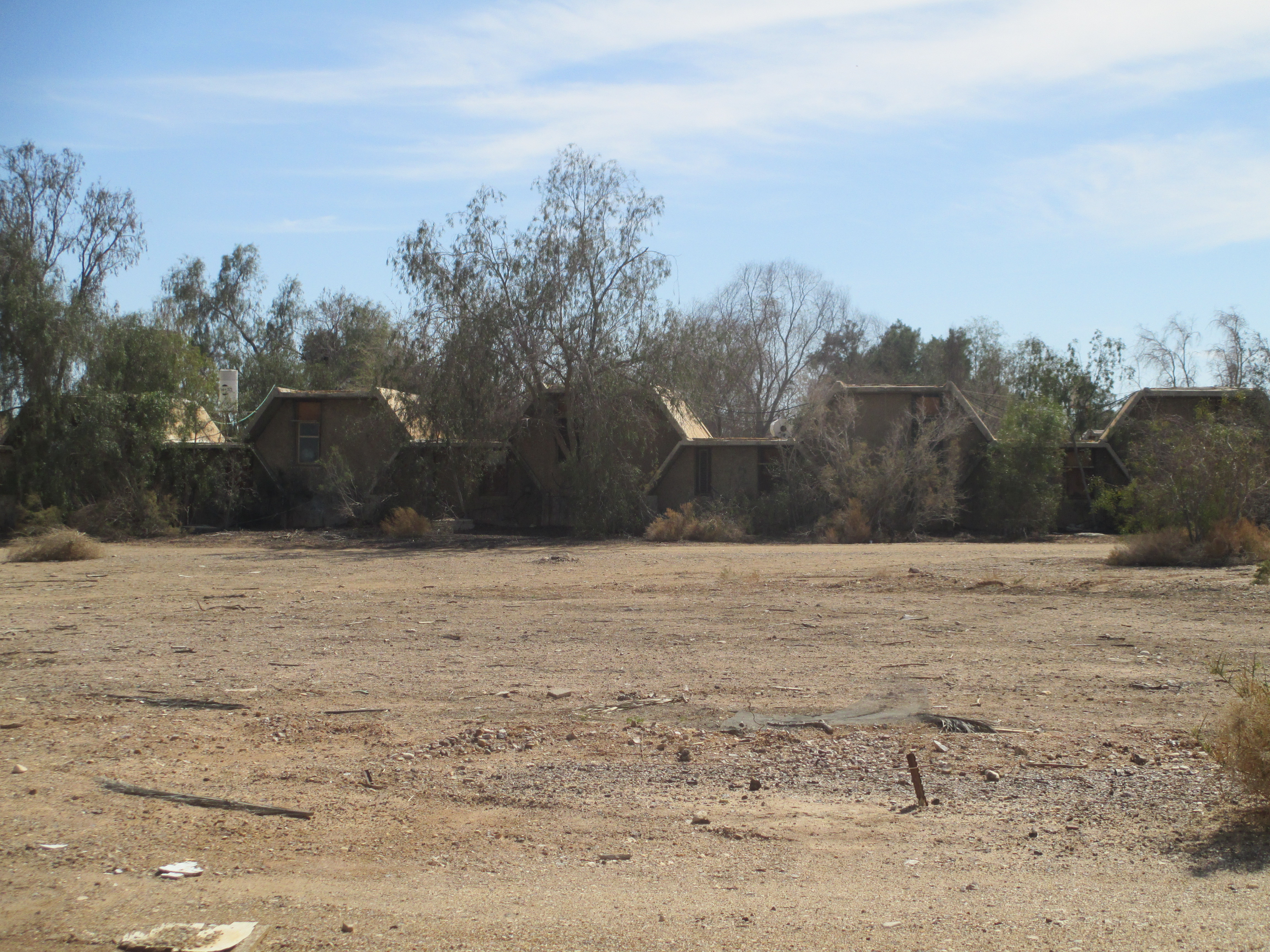 בית ספר שדה חצבה